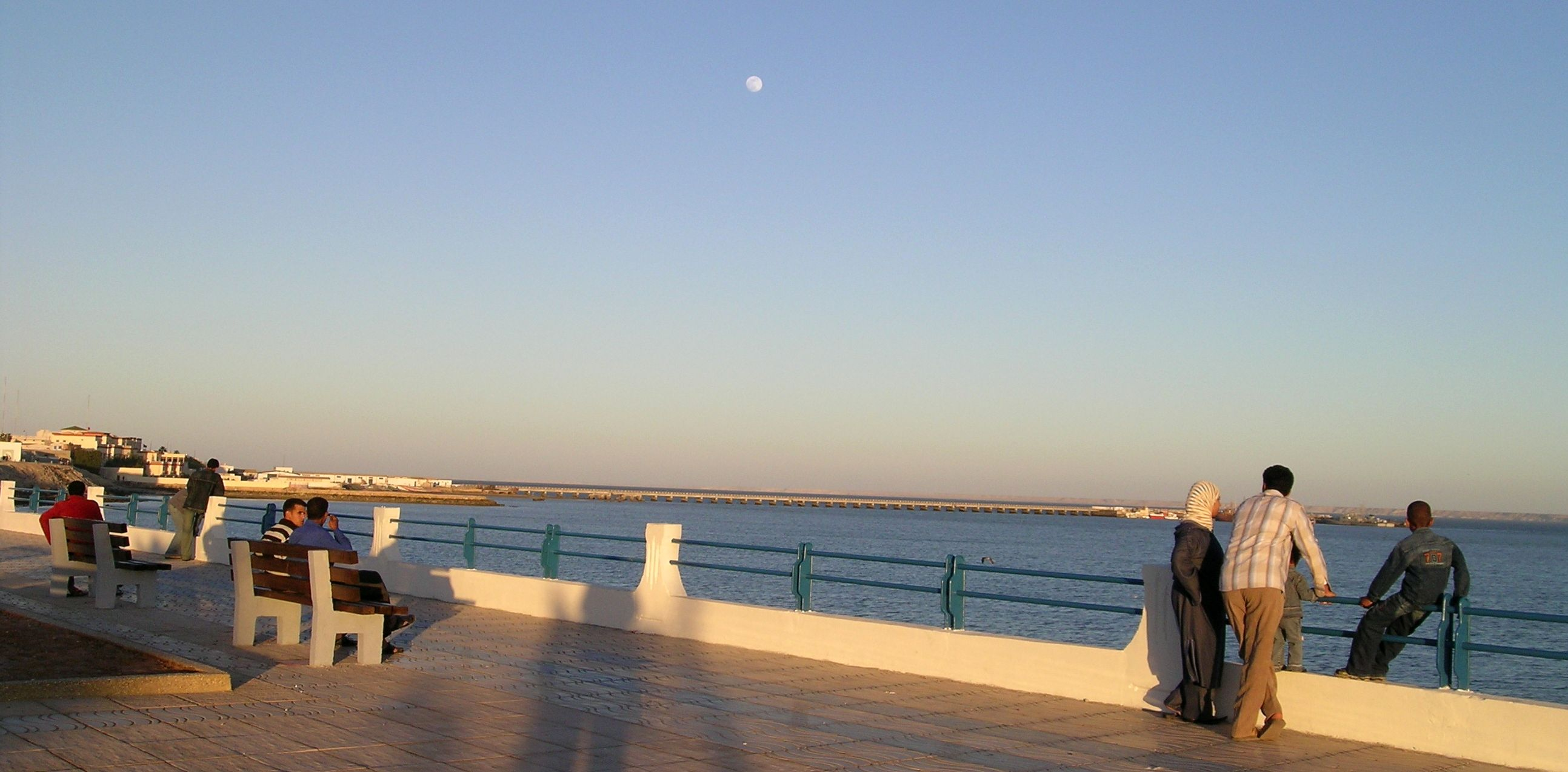 Borde de la península de Río de Oro, en Dajla (Sahara Occidental).